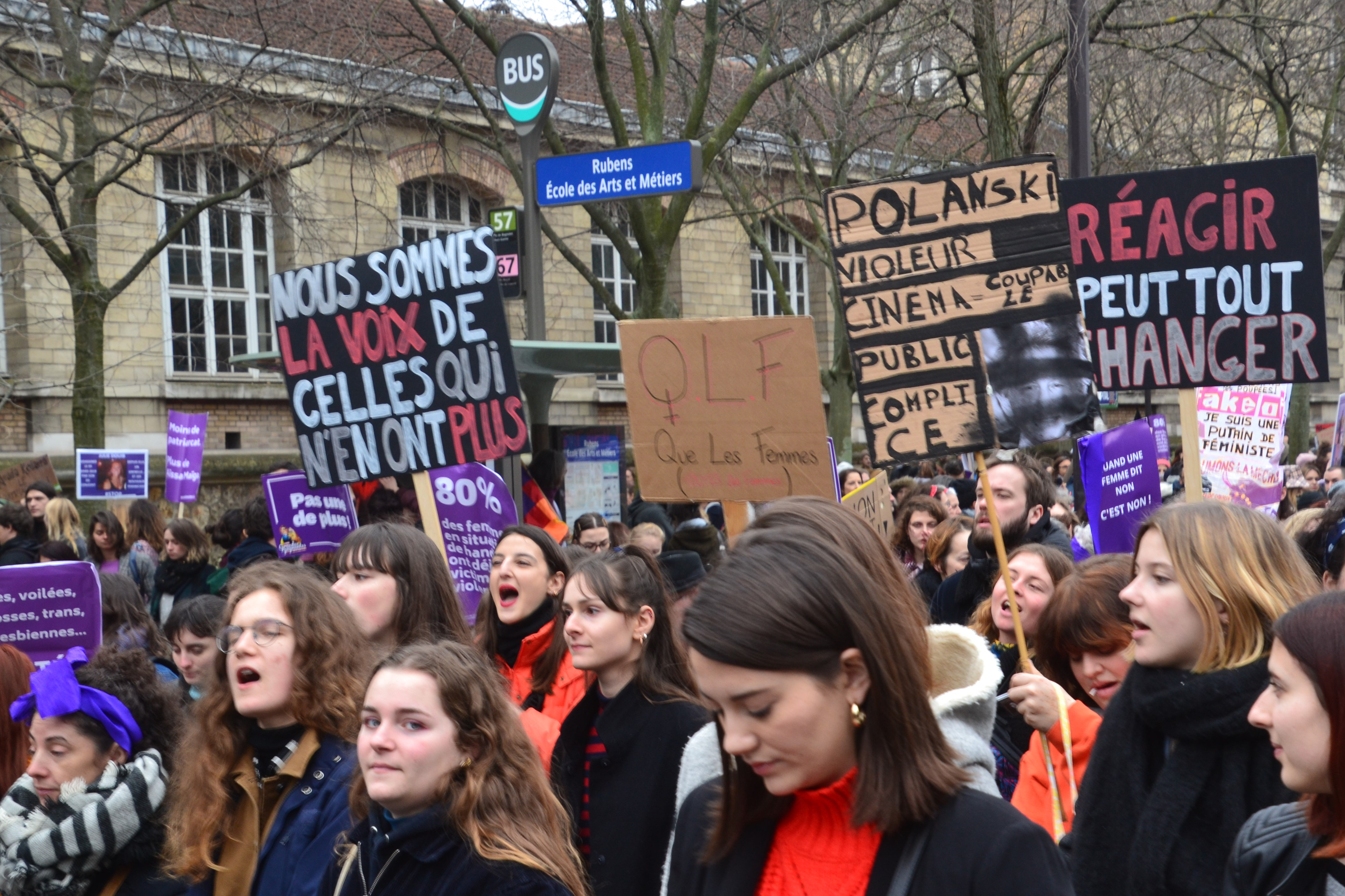 Journée internationale des droits des femmes.